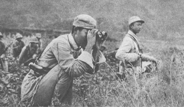 1945年8月，八路军胶东部队向胶济路东段进军，8月17日解放威海卫，19日解放福山，20日解放龙口，21日解放招远、莱阳、黄县，23日解放烟台，26日解放即墨，使北海、东海两区全部解放，包围了青岛市。图为供沾威海卫的胶东部队指挥所。